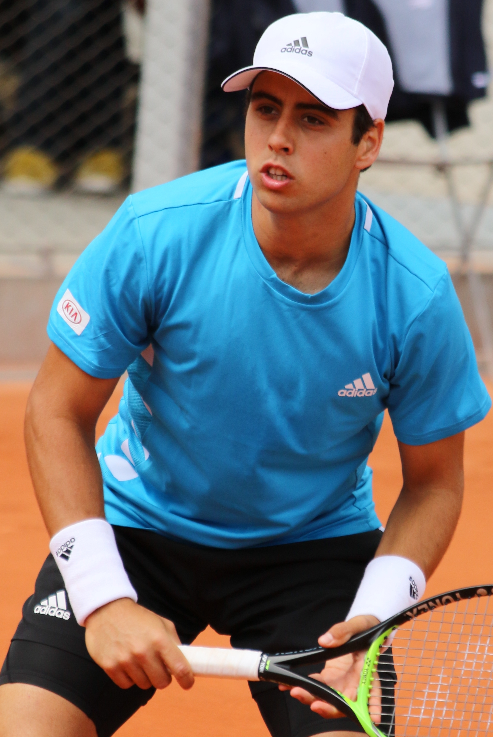 Munar RG19 (28)